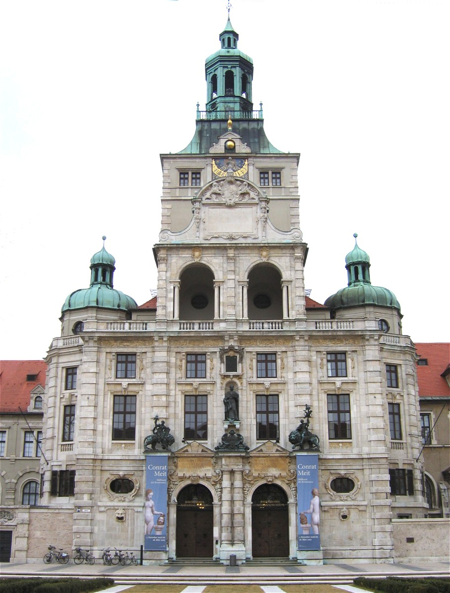 Bayerisches Nationalmuseum in München